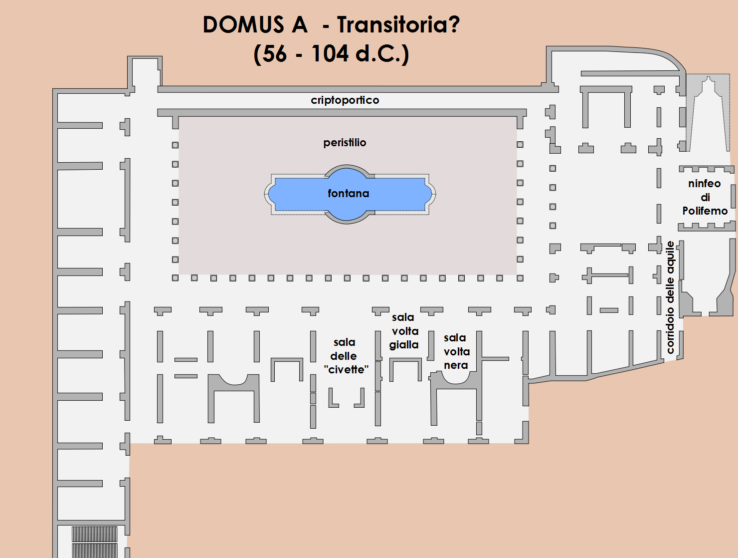 Domus Transitoria sul colle Oppio (56-104 d.C.)